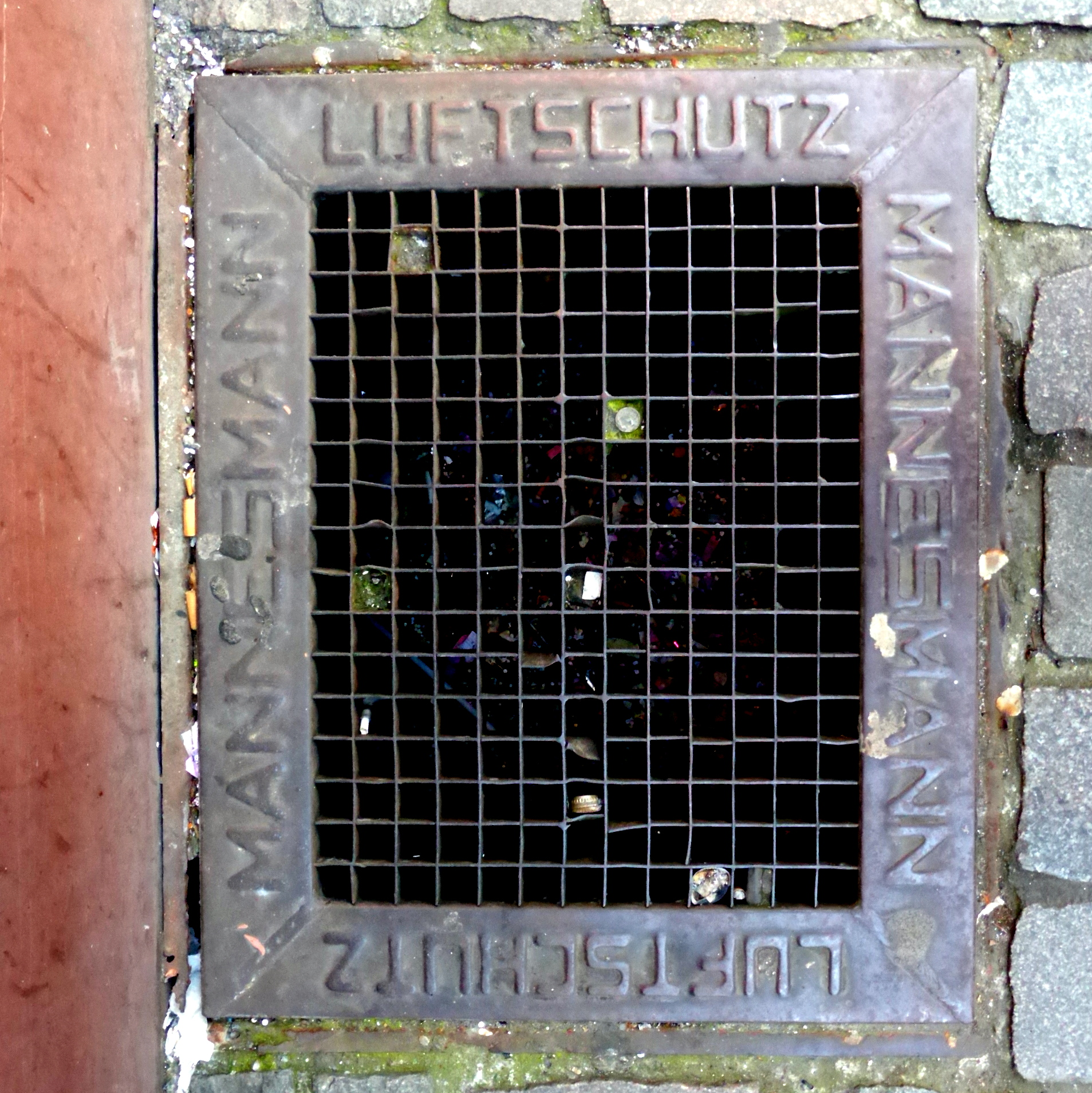 Mannesmann-Luftschutz-Gitter